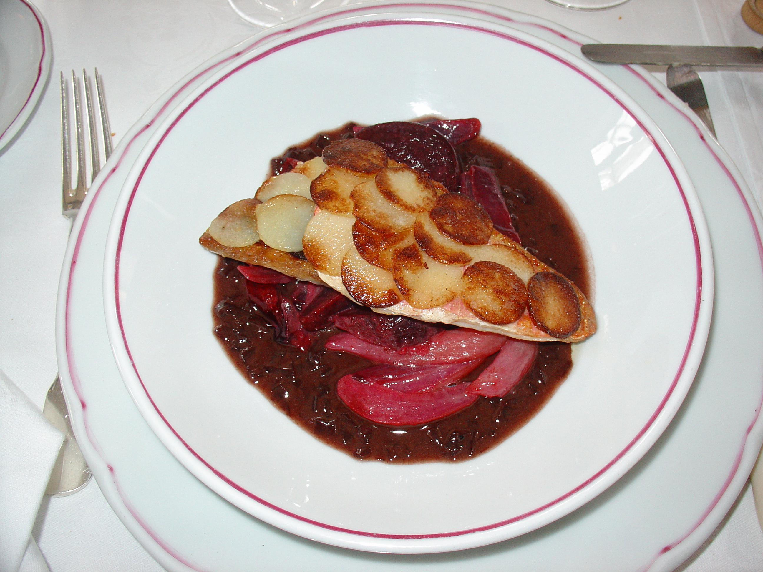 Rouget barbet en écailles de pommes de terre. Beurre rouge et fricassée de légumes rouges (oignons rouges, betterave, radis)